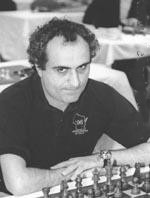 Dmitry Gurevich